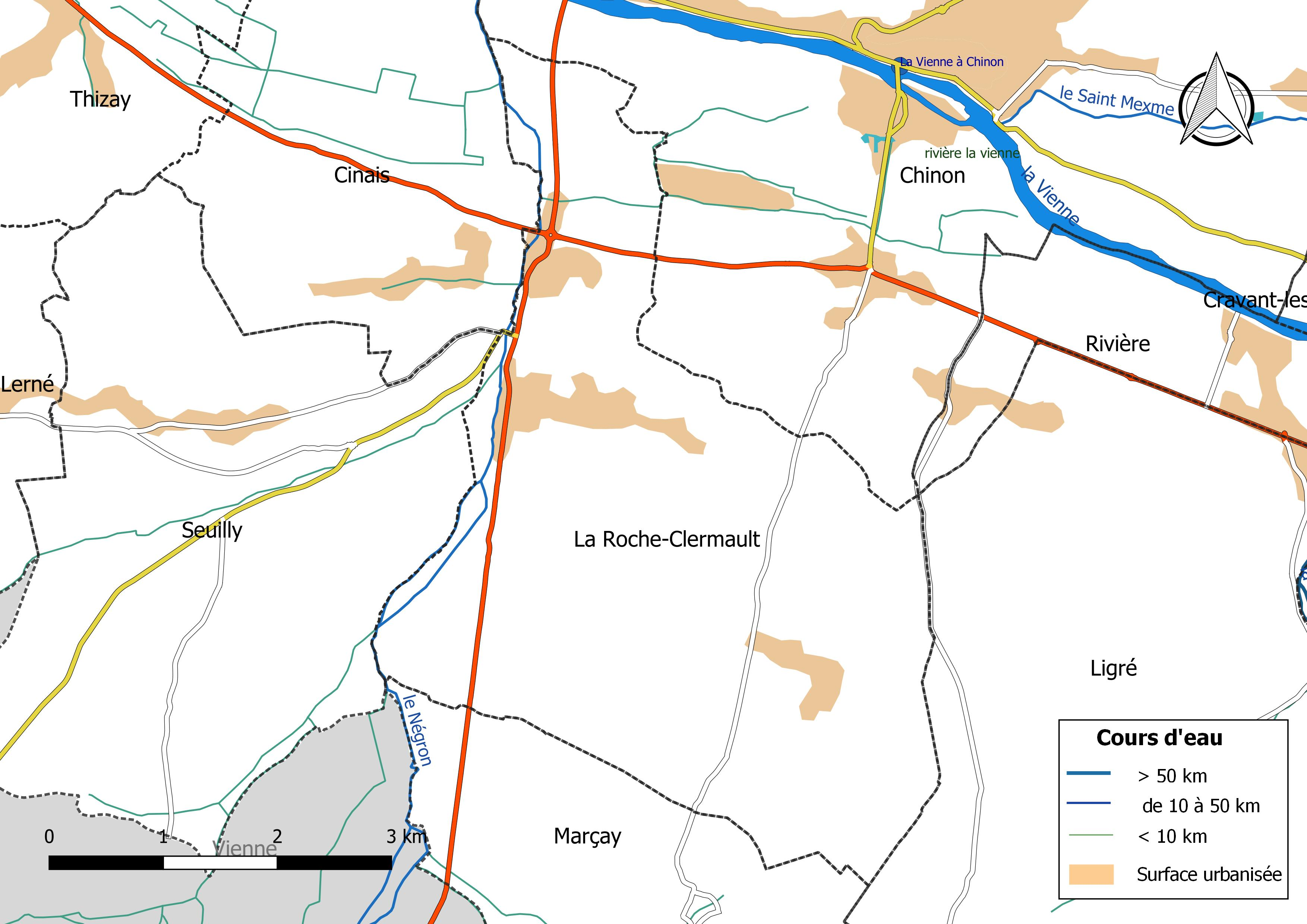 Carte du réseau hydrographique de la commune de La Roche-Clermault (France).